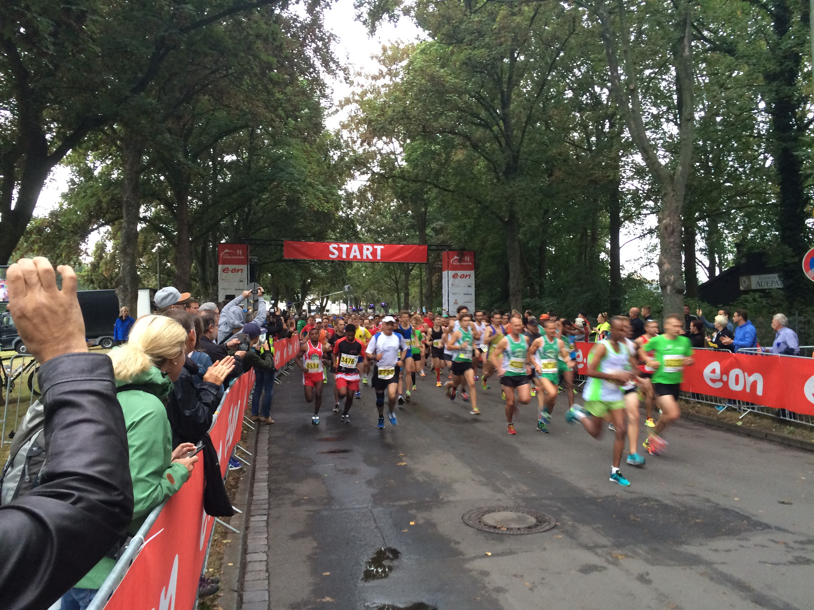 10. E.ON Kassel-Marathon 2016: Start des Halbmarathons in der Damaschkestraße